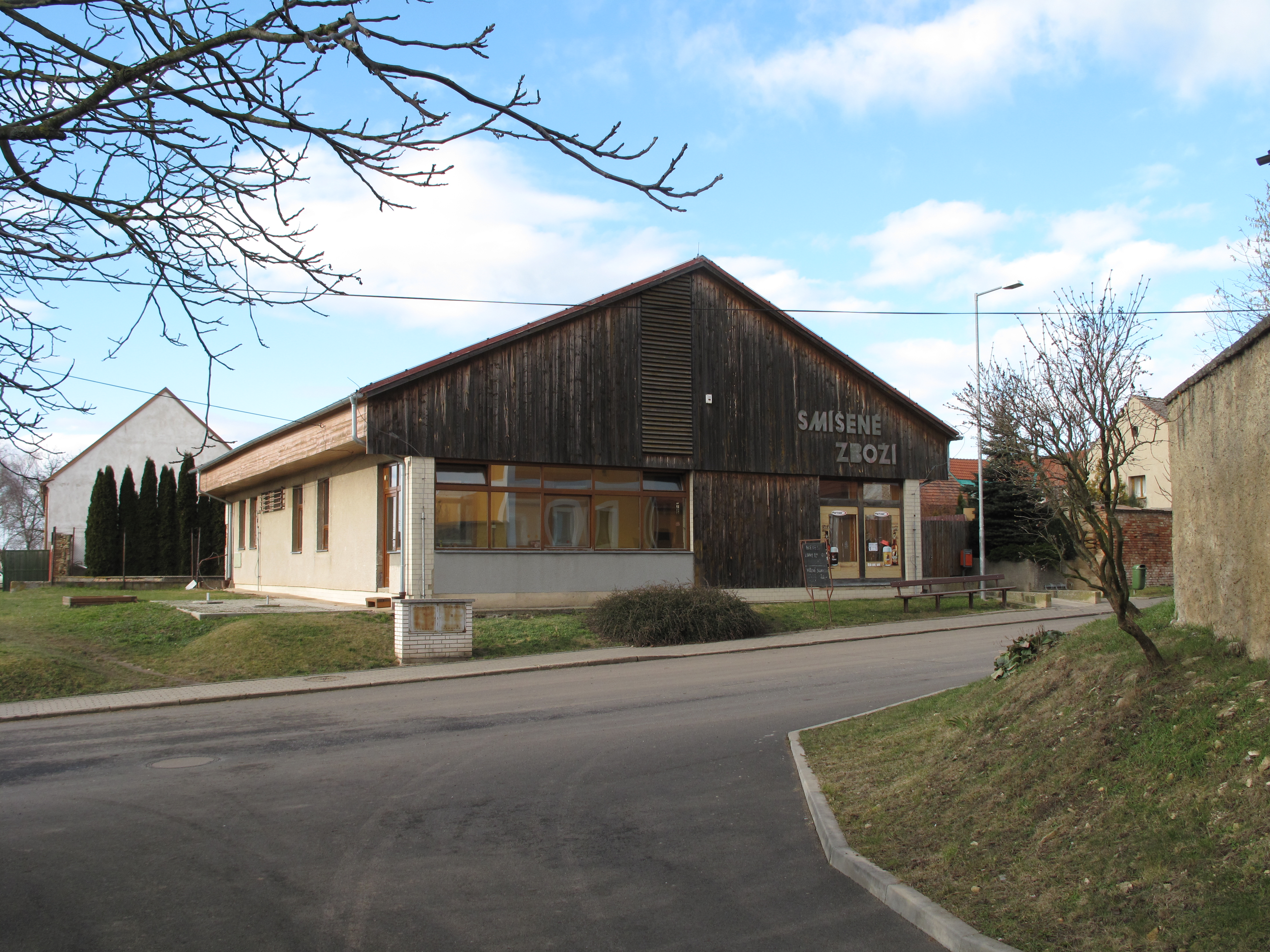 Prodejna v Pohořicích. Okres Litoměřice, Česká republika.